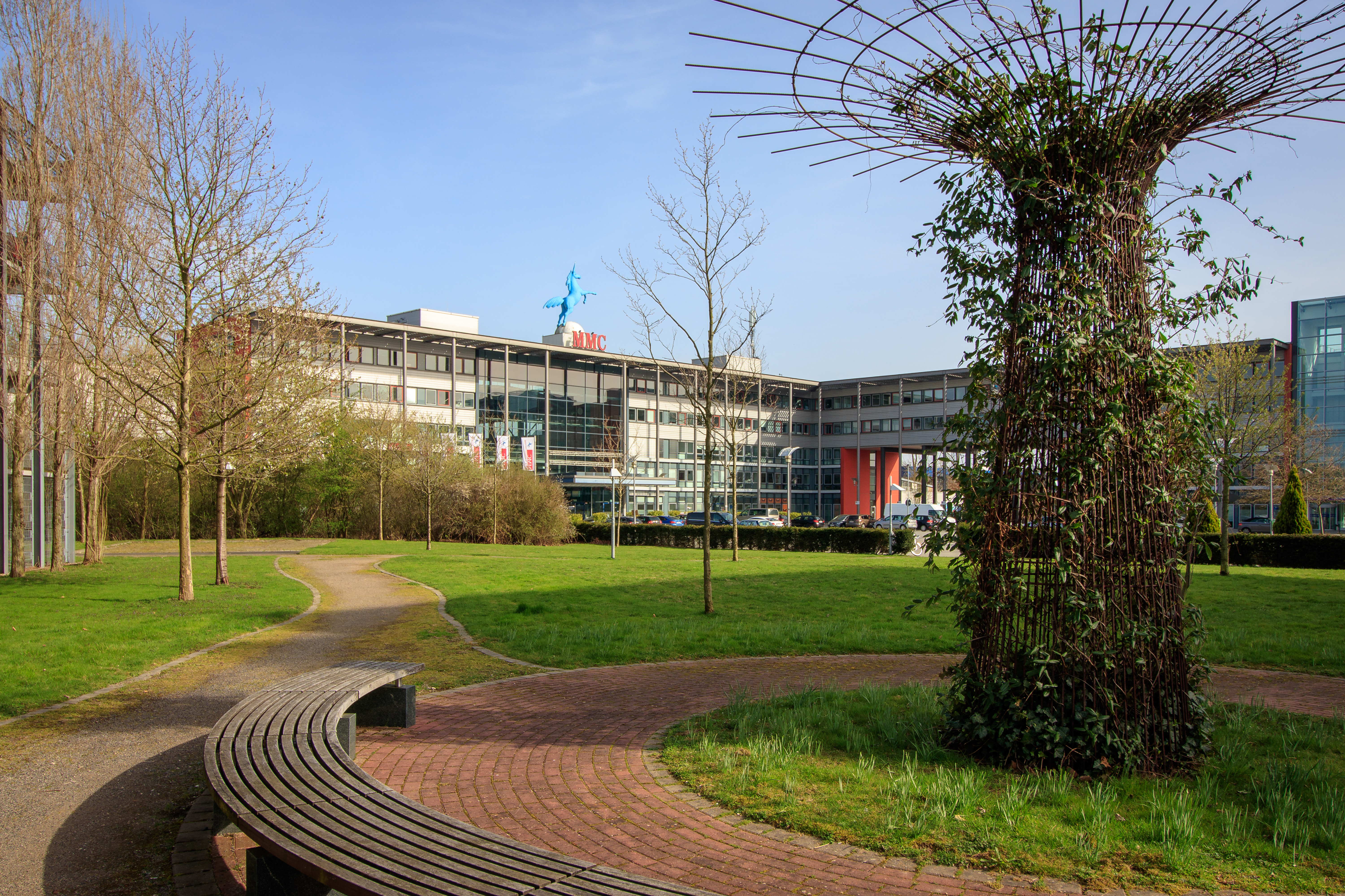 Studiokomplex Coloneum der Magic Media Company in Köln-Ossendorf